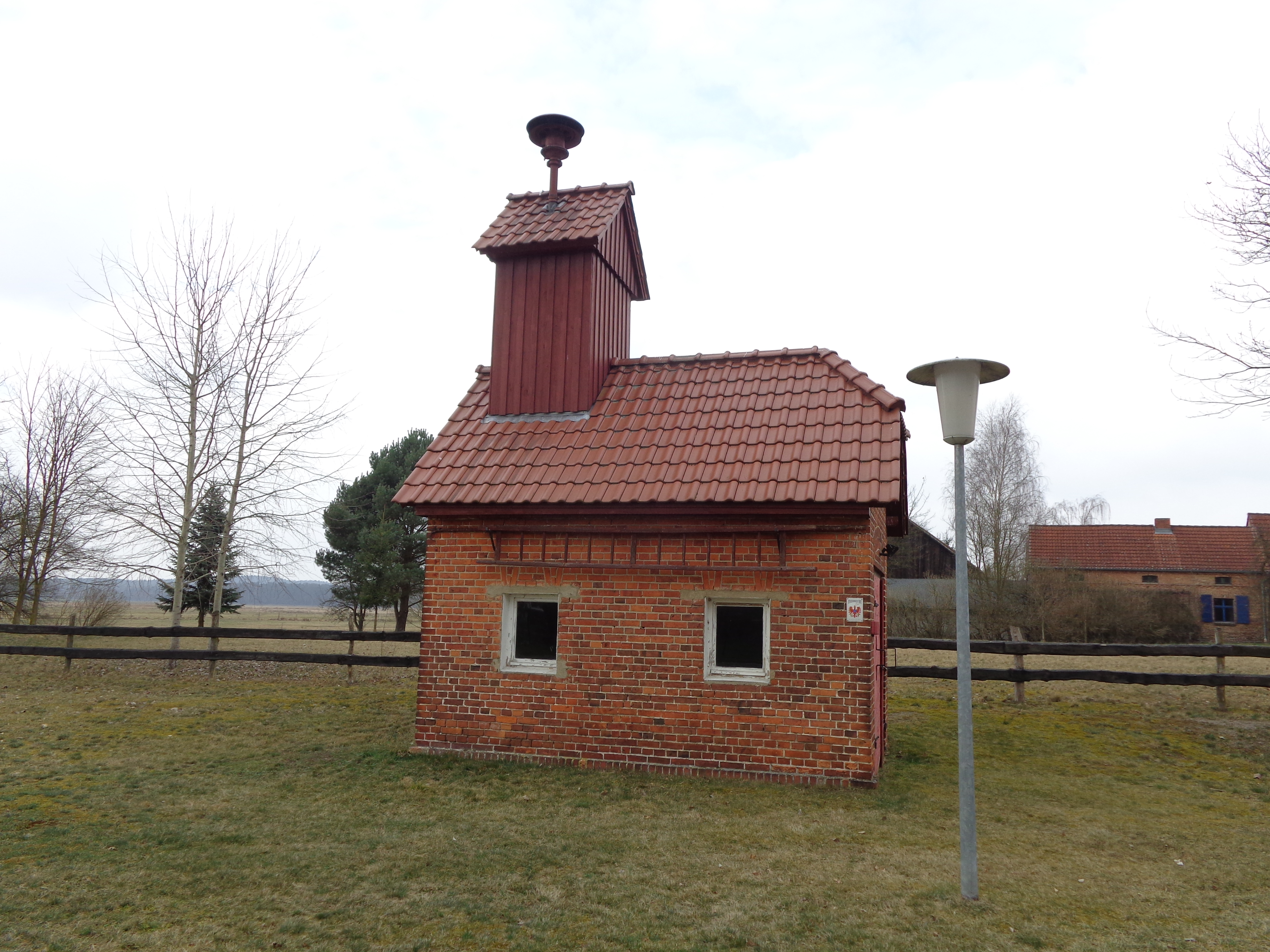 Feuerwehrhäuschen in Plattkow, Ortsteil der Gemeinde Märkische Heide, Landkreis Dahme-Spreewald, Brandenburg, Deutschland